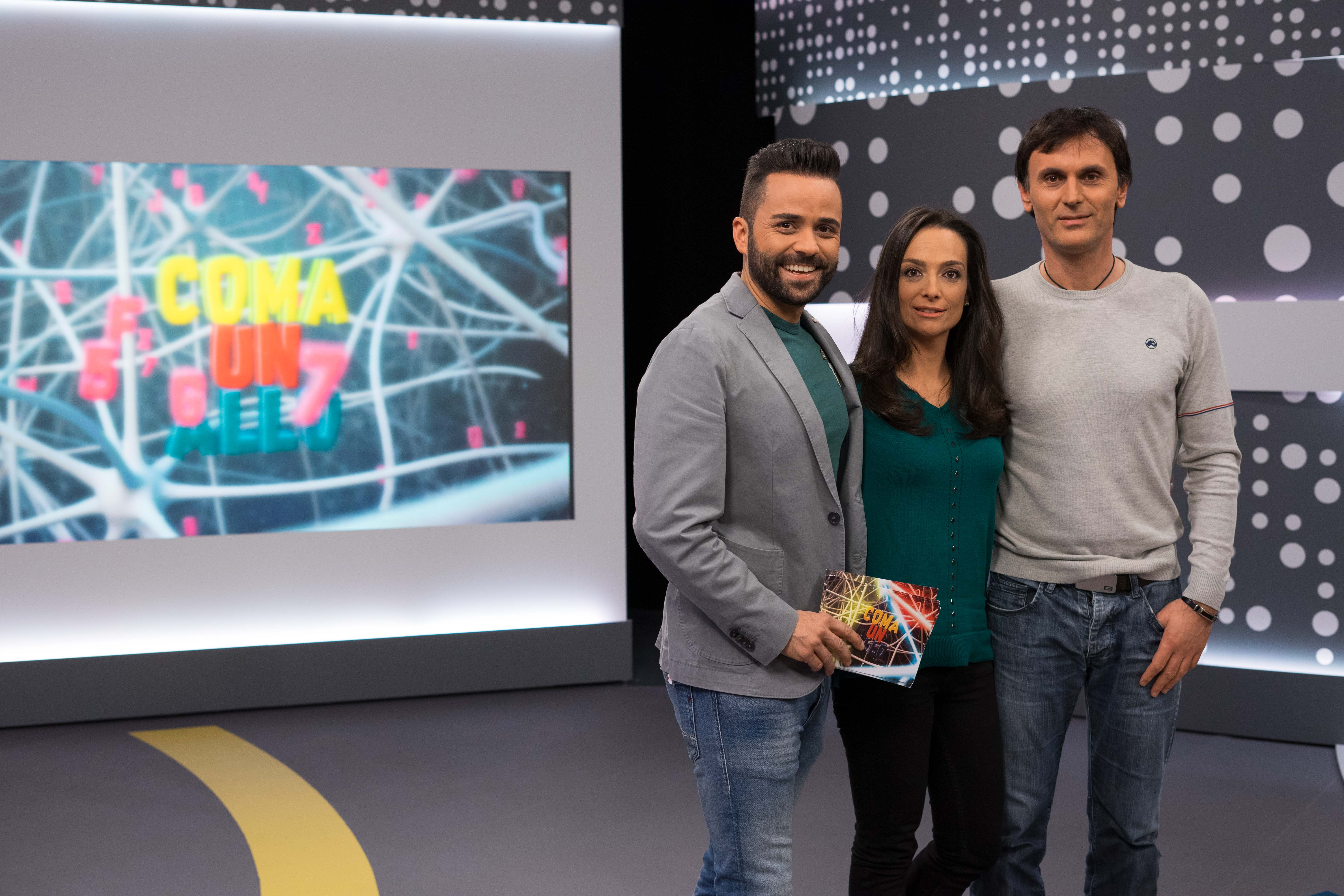 Os presentadores do programa Coma Un Allo da TVG pousando xunto a pantalla de fondo do plató